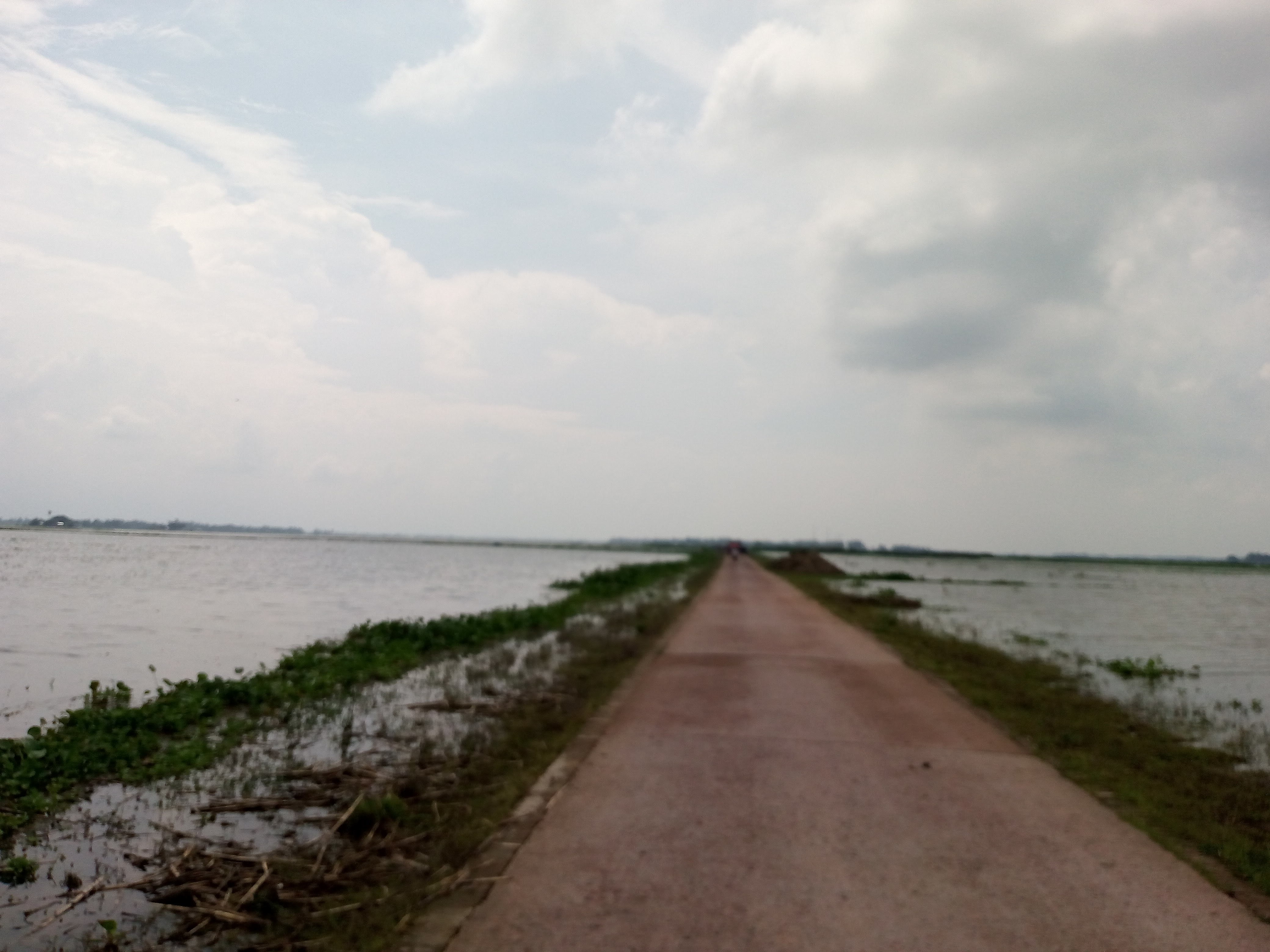 চলন বিল এর মদ্ধস্থ রাস্তা,এটি সিরাজগাঞ্জ জেলার তারাশ থানার বারুহাস থেকে নাটোরে শিঙরা এর সংযোগ সড়ক